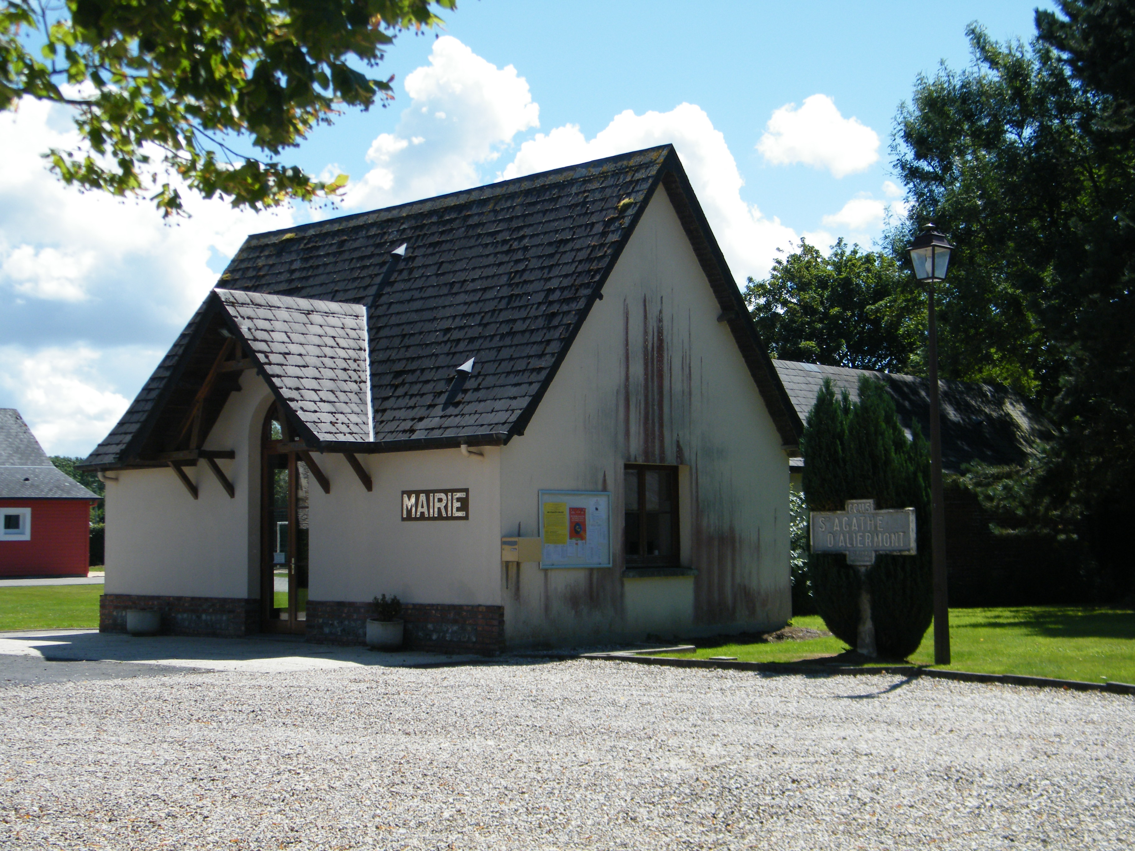 Sainte-Agathe d'Aliermont, Seine-Maritime, France, mairie